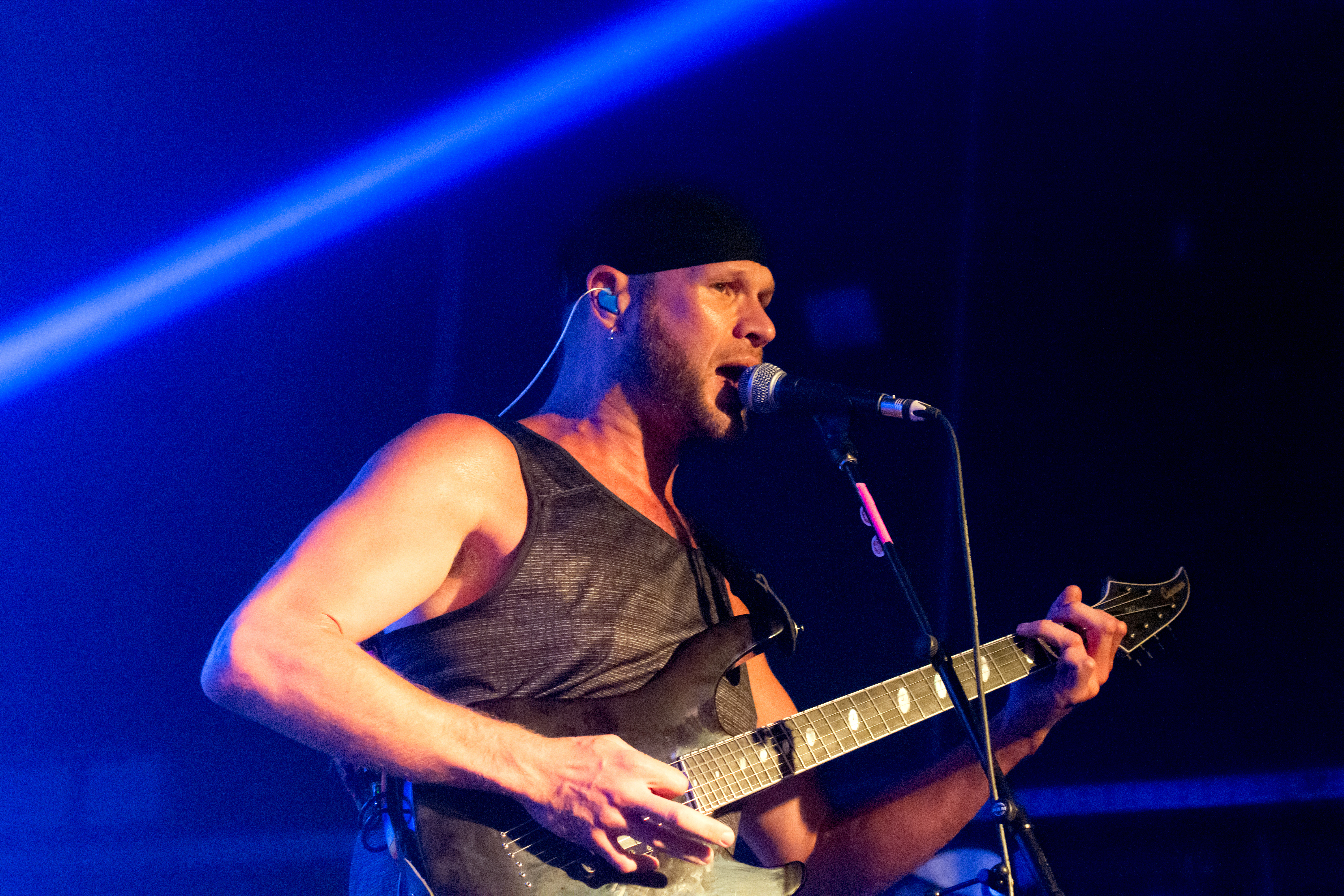 Killswitch Engage beim Rawk Attack 2016